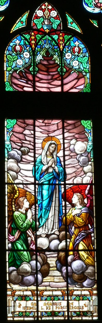 Catedral de São Pedro de Alcântara (Petrópolis, estado do Rio de Janeiro, Brasil) : Vitral mariano : Detalhe : Assunção